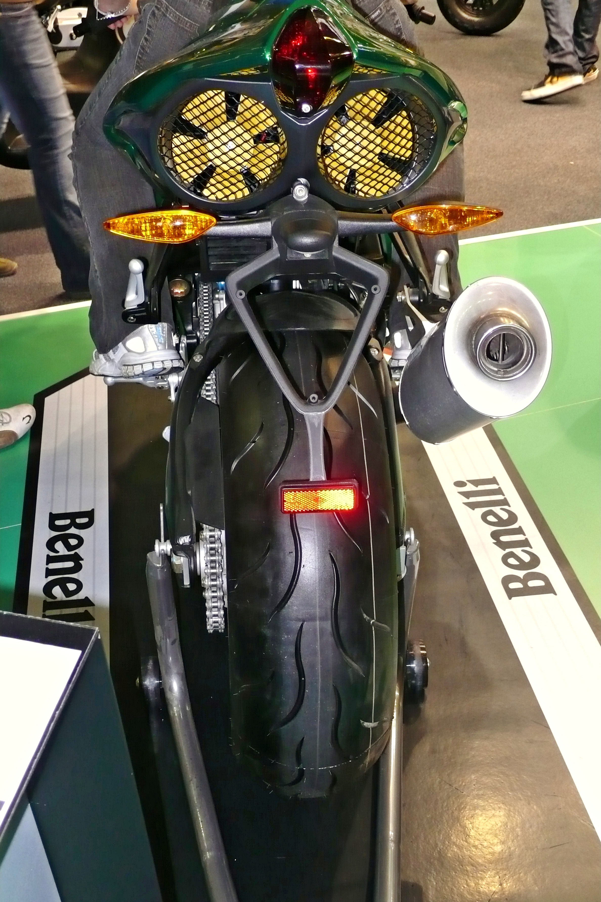 salon de la moto de barcelona-2006